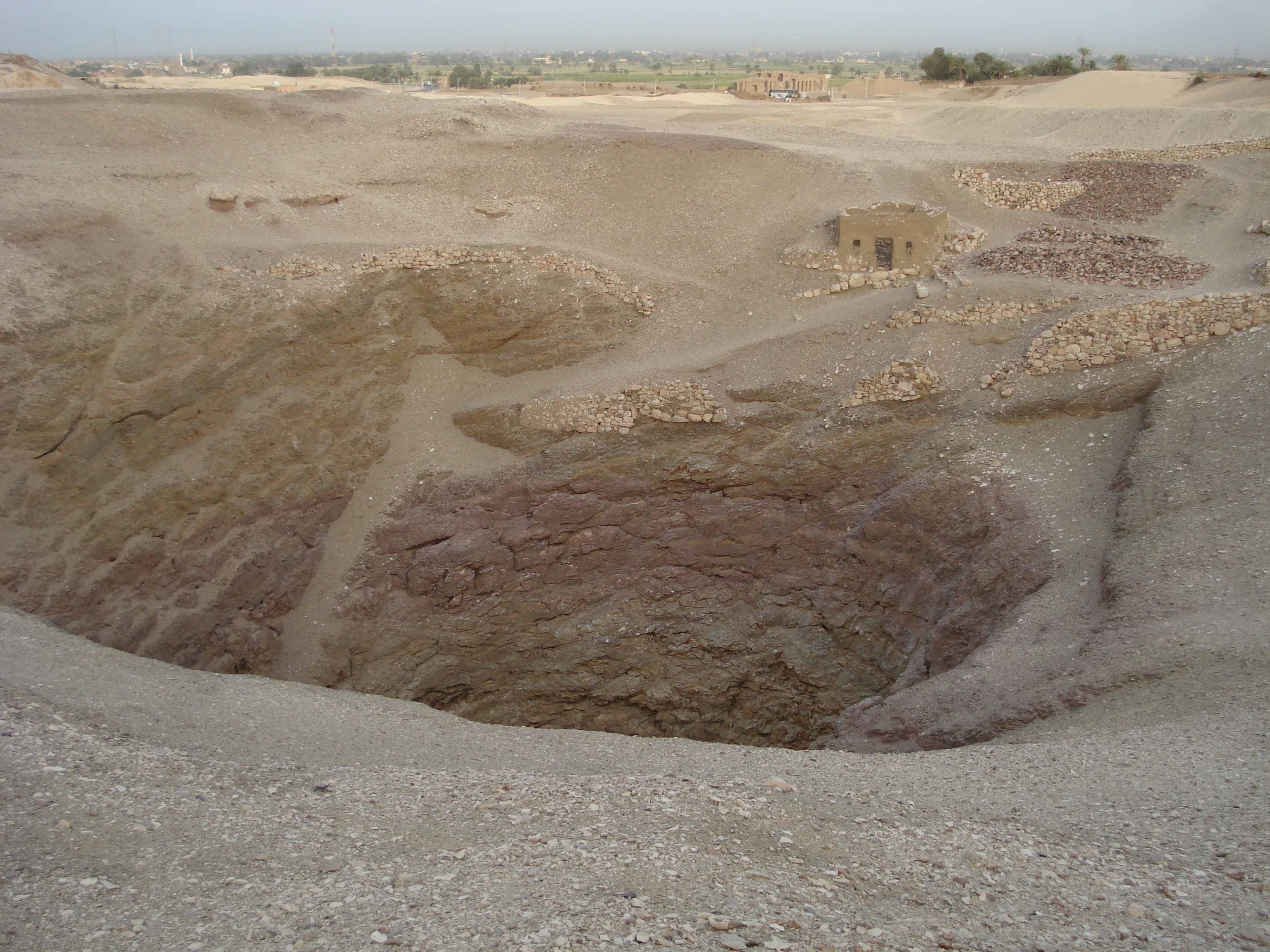 A "nagy gödör" Dejr-el-Medine mellett (Luxor, Egyiptom)